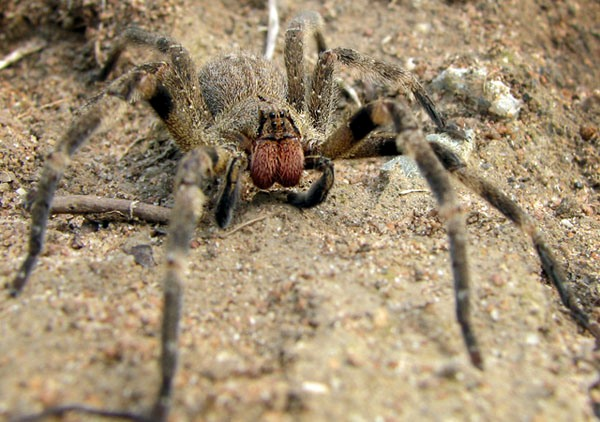 Brazilian wandering spider